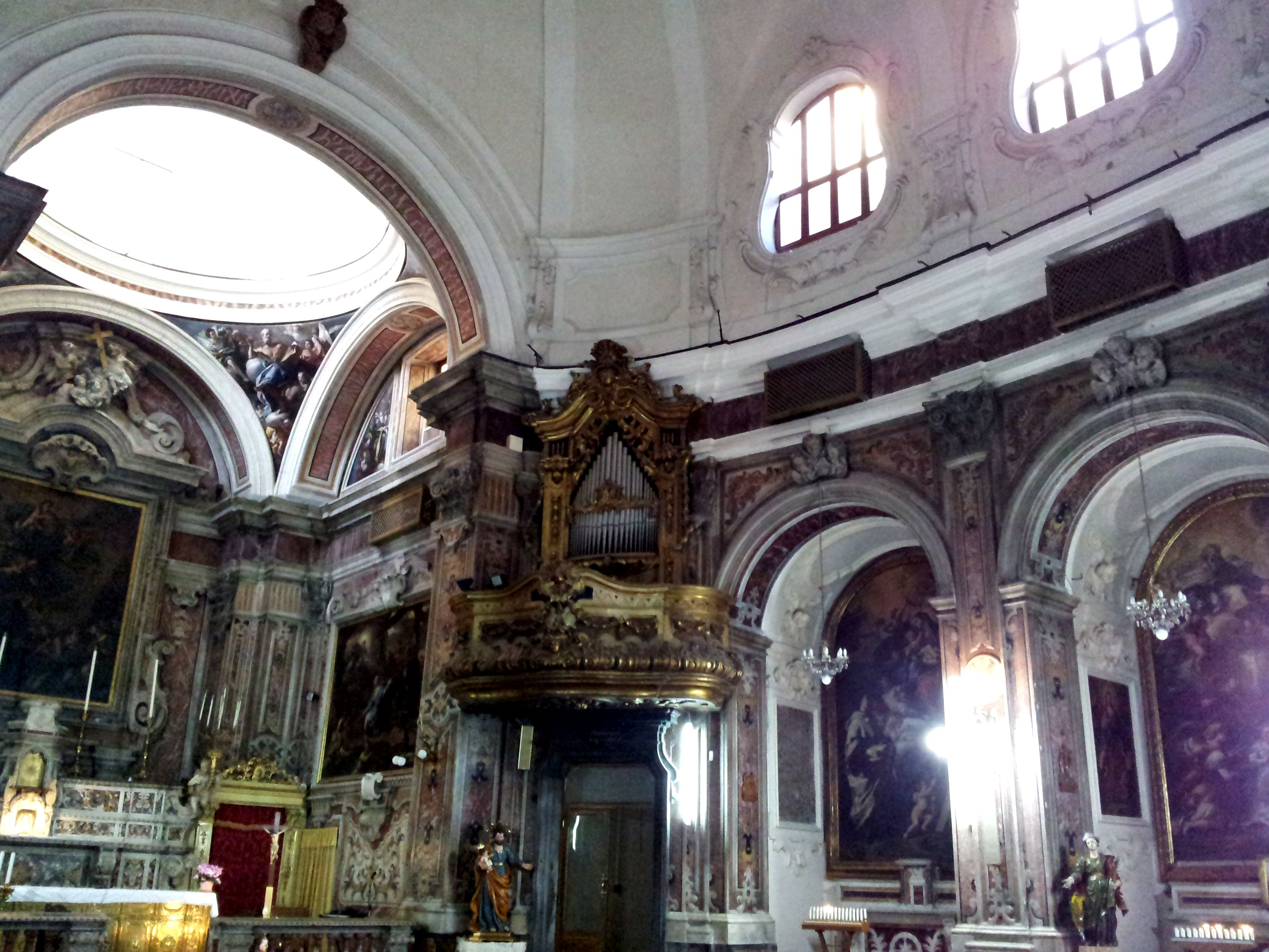 Chiesa di Santa Maria Egiziaca a Forcella (Napoli) - Lato destro